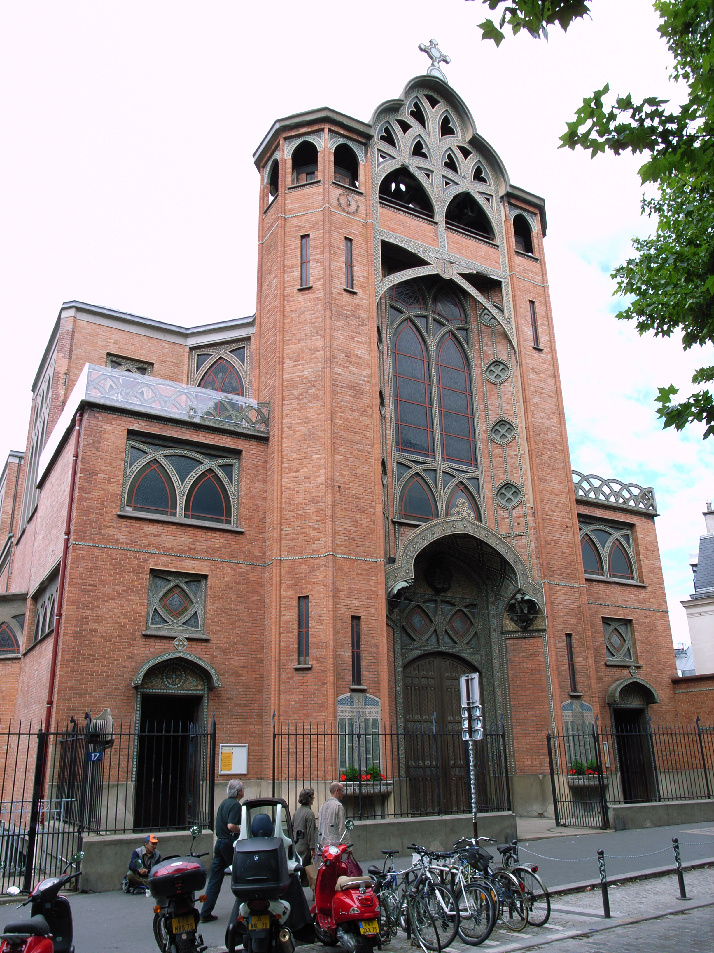 Saint-Jean-de-Montmartre (1894-98) by Anatole de Baudot